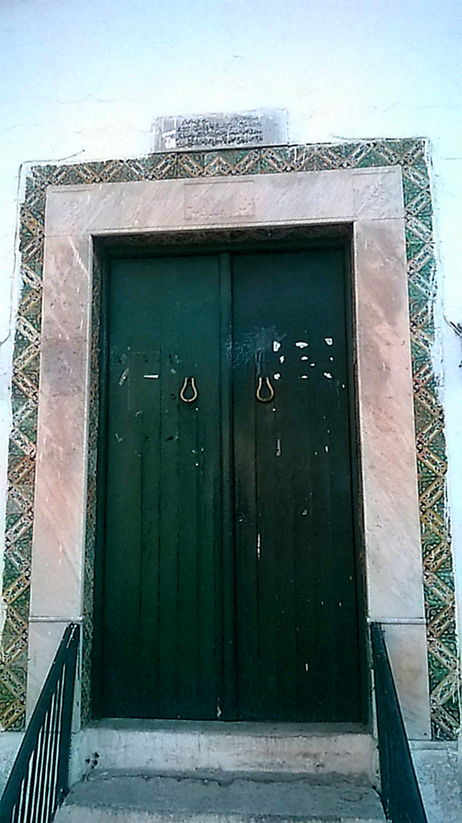 Sidi El Béchir , Tunis سيدي البشير ، تونس